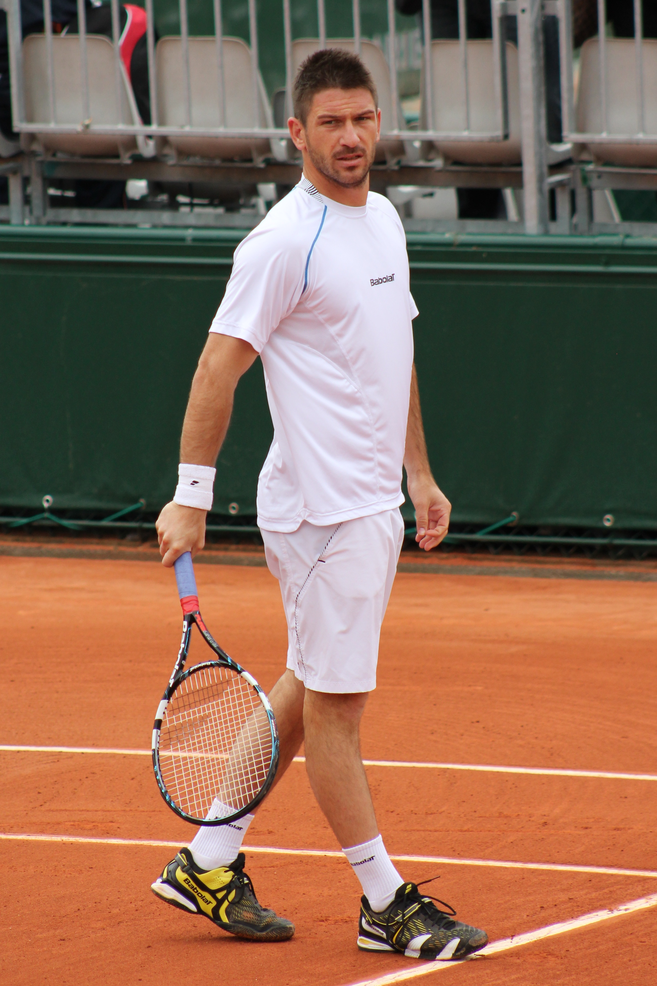 Hajek RG13 (2)